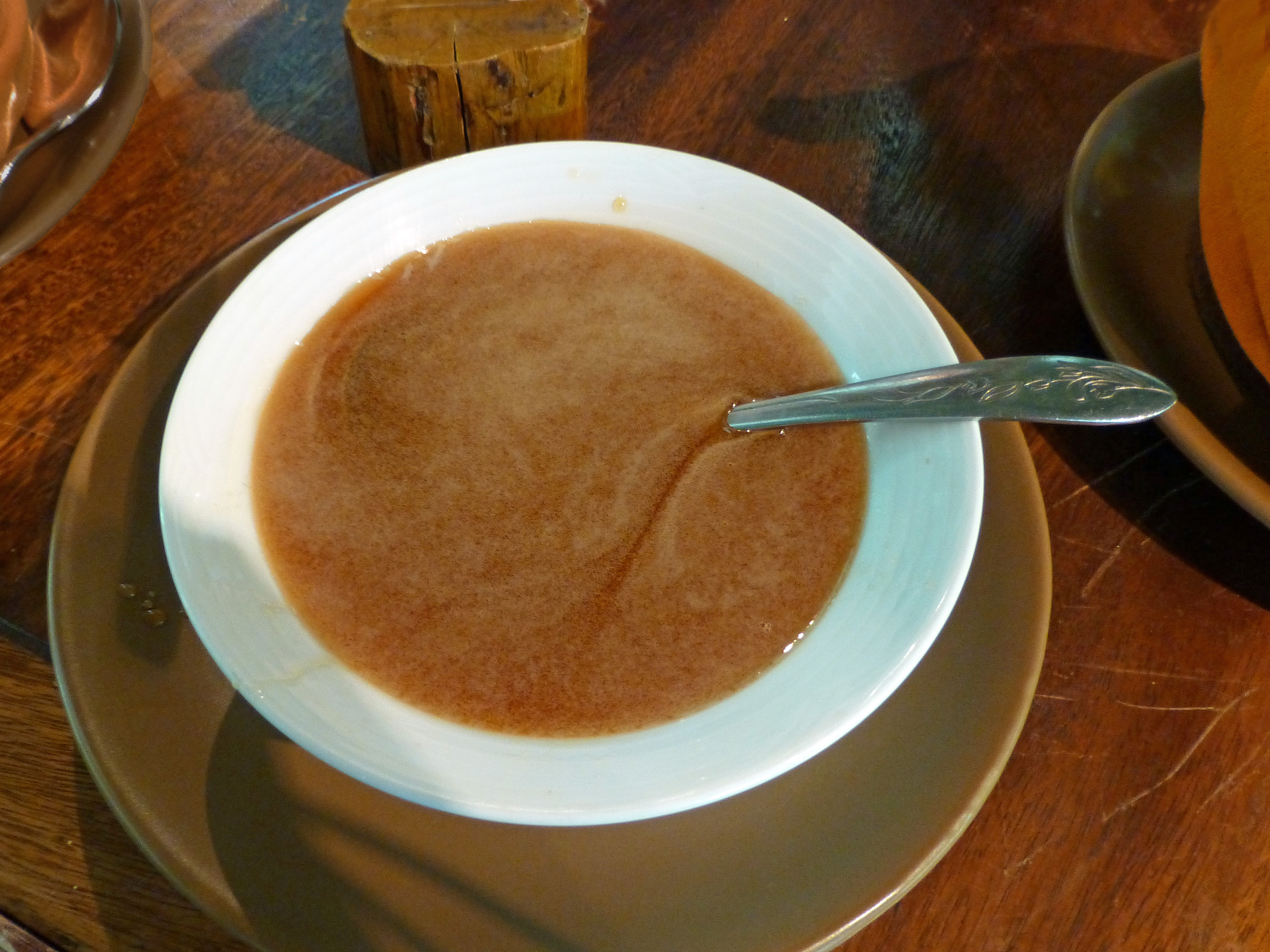 Treacle (Sri Lanka)